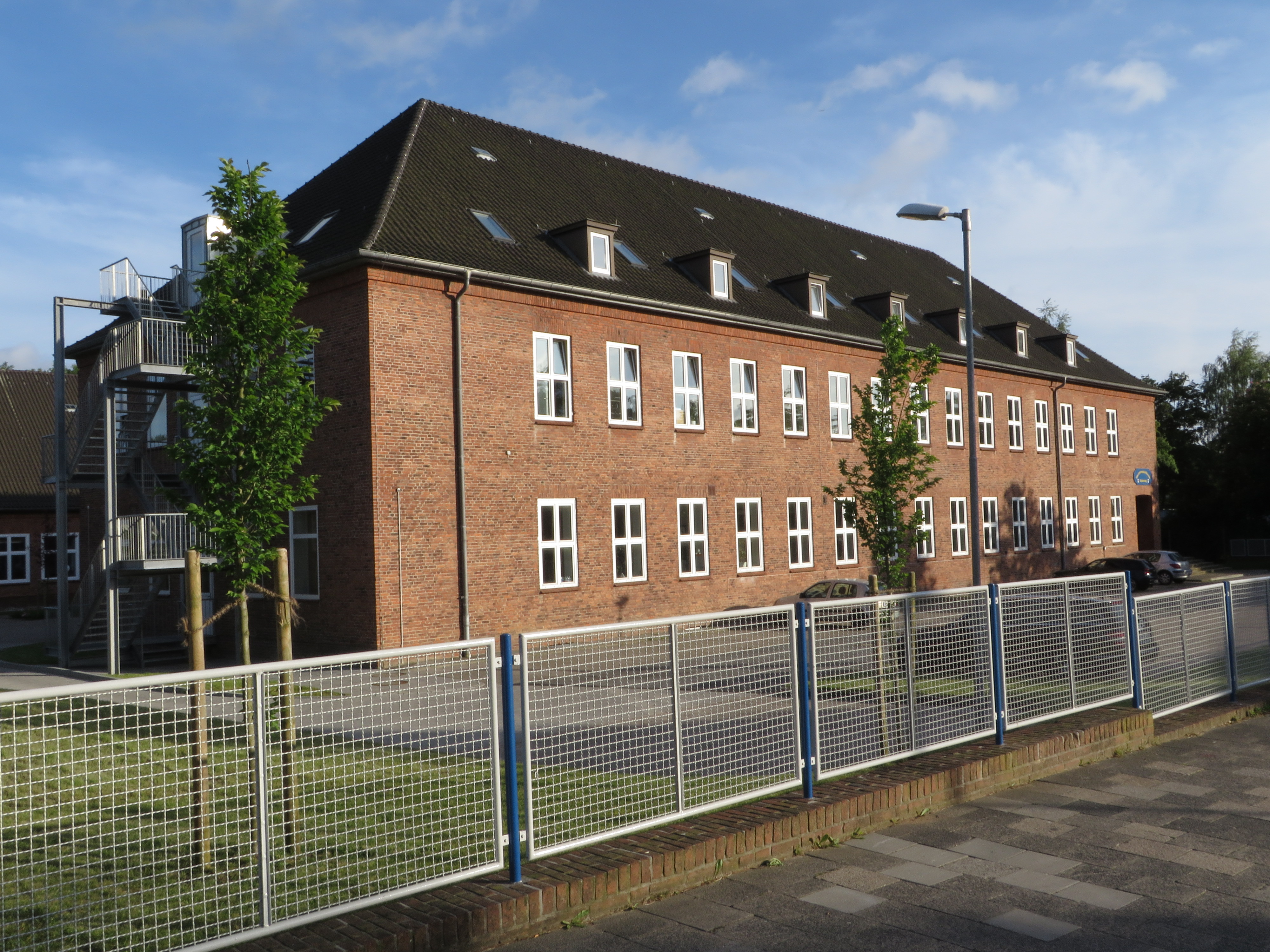 Marineschule Mürwik Stabszug, Bild 002